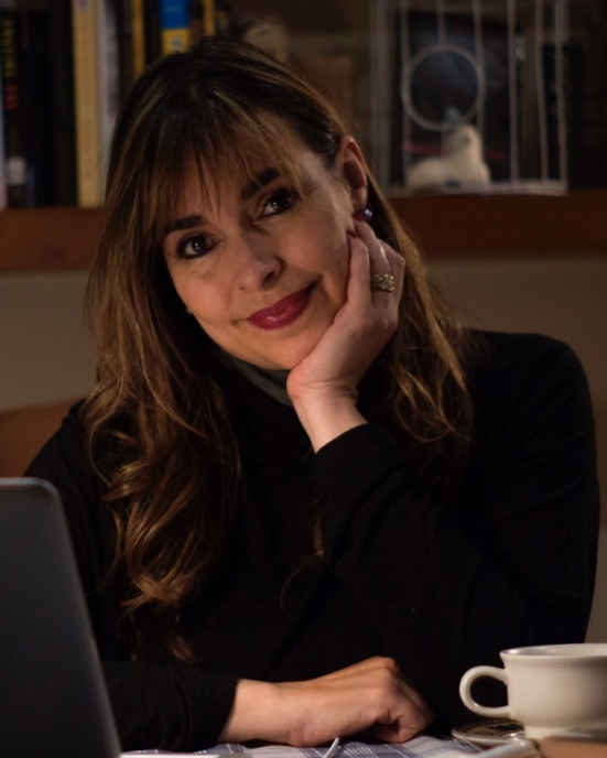 Nery Santos Gómez en Bogotá